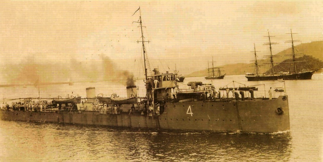 CT Rio Grande do Norte (CT-4), navio tipo contratorpedeiro da Marinha do Brasil. Navios veleiros mercante ao fundo. Estaleiro: Yarrow Shipbuilders